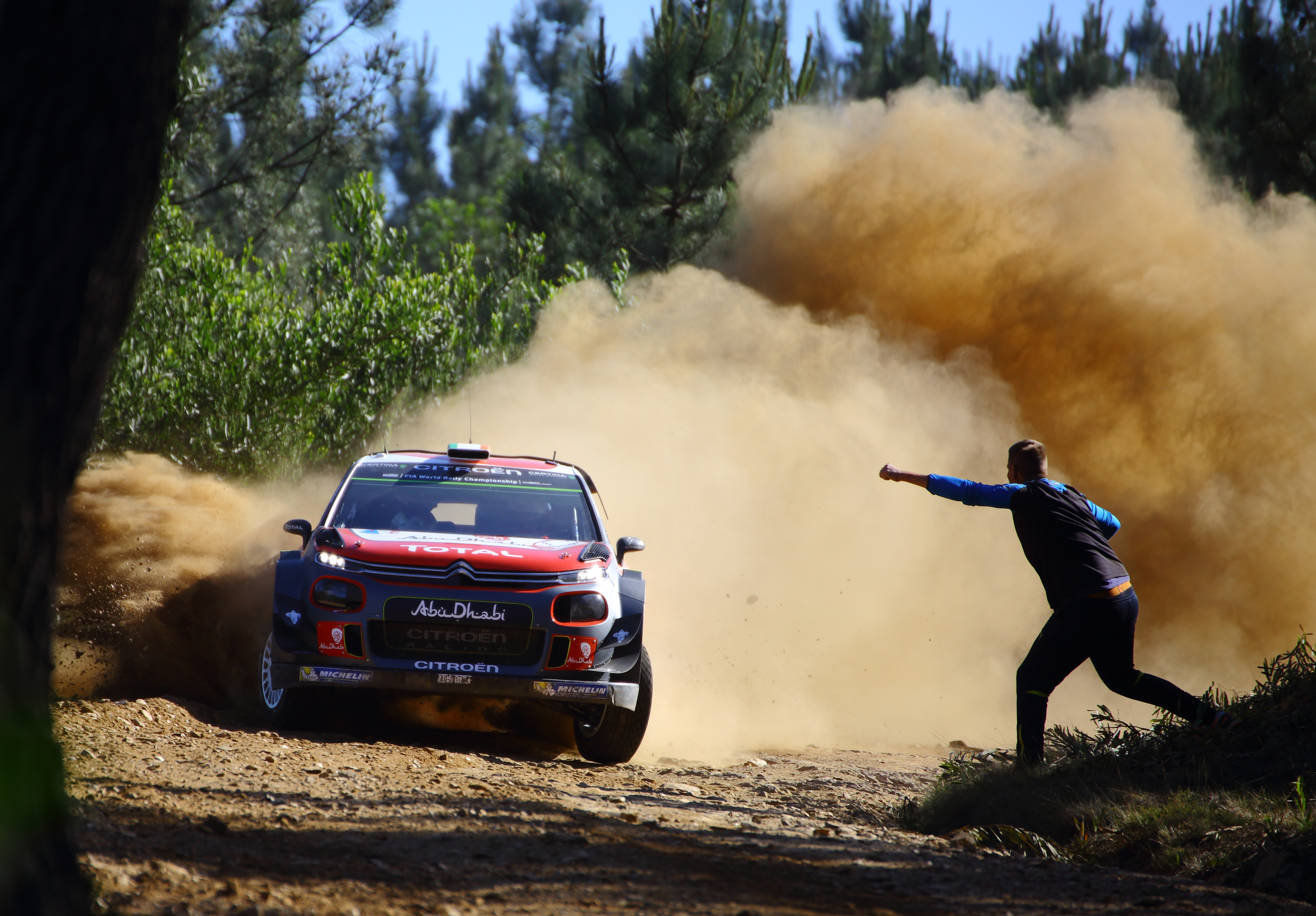 2017 Rally Portugal